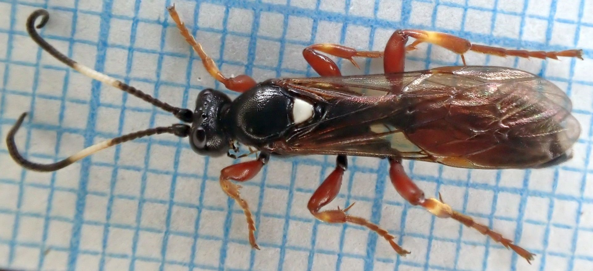 Praktveps hunn